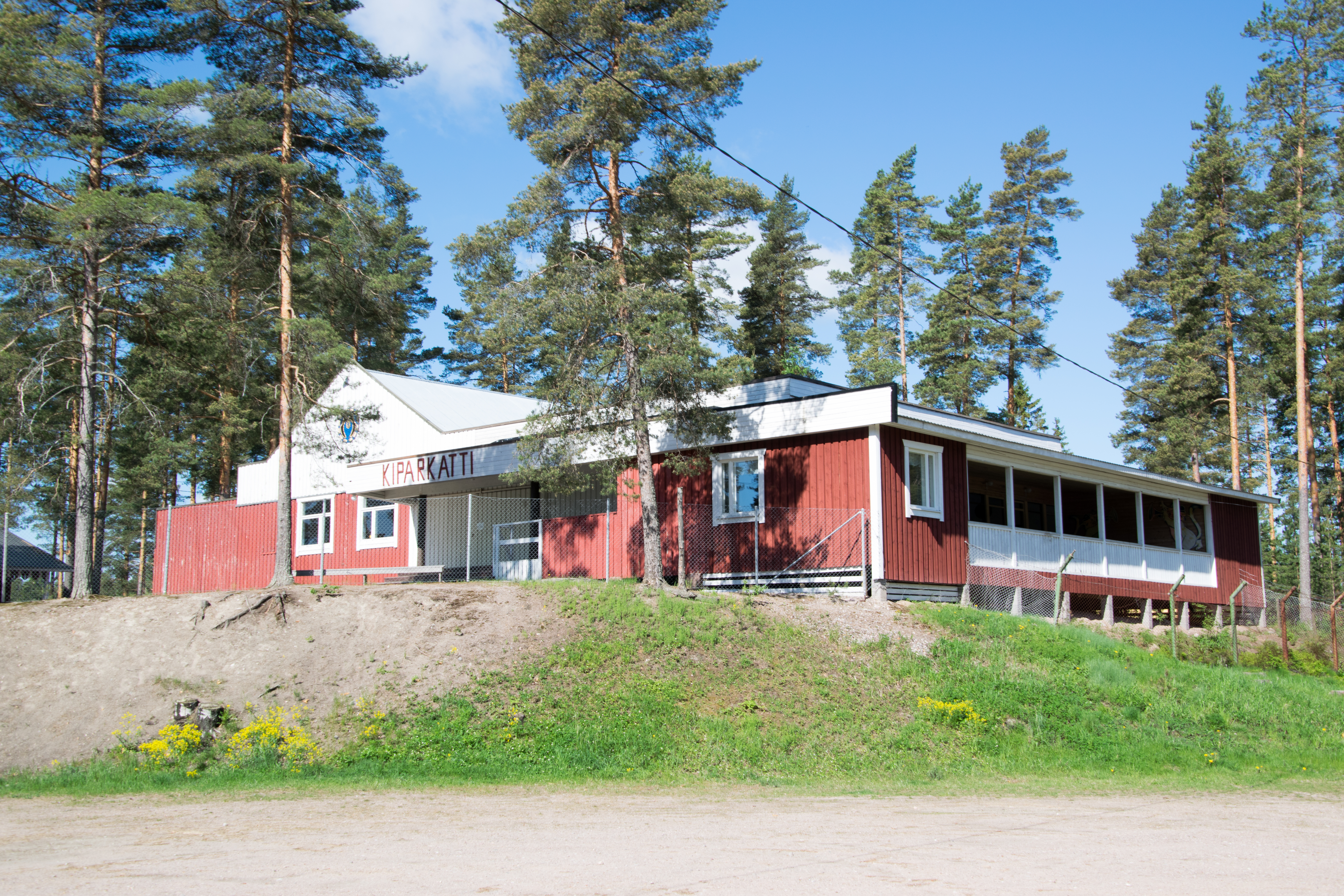 Kiparkatti tanssilava